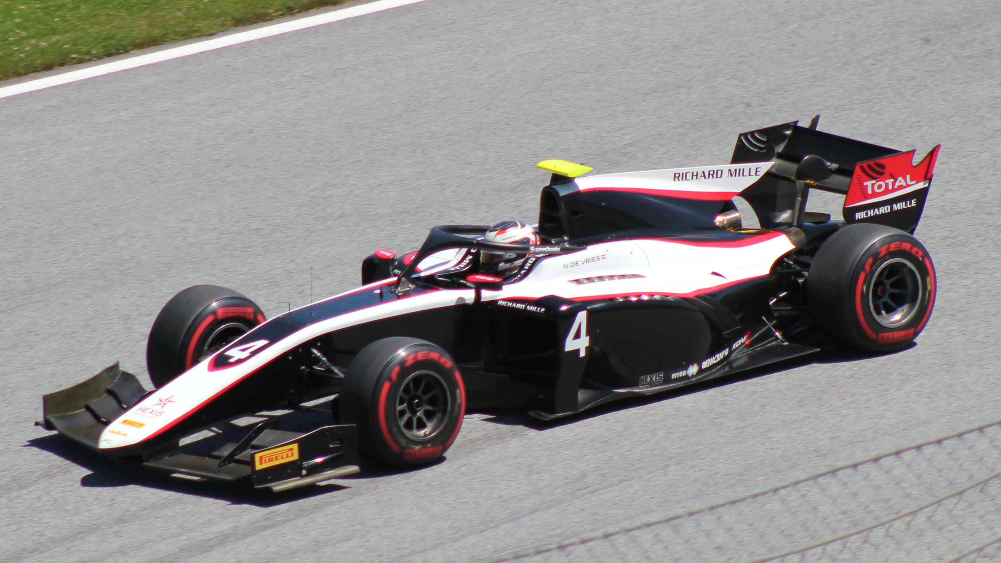 De Vries beim Rennwochenende in Österreich 2019